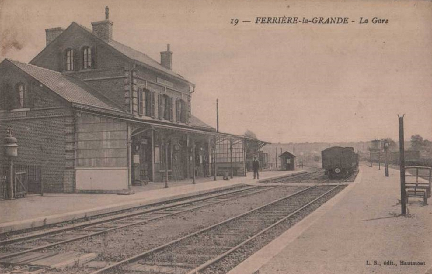 Gare de Ferrière-la-Grande, Nord, Nord-Pas-de-Calais, France.